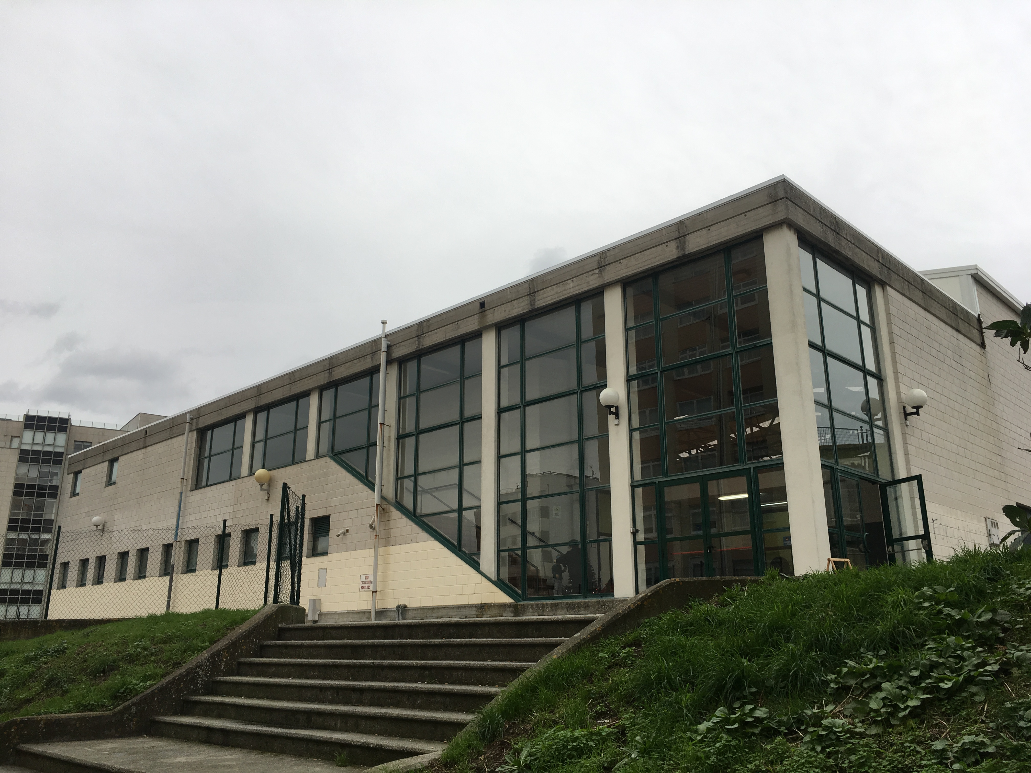 Pavillón de Monte Alto na na Rúa Alcalde Sanjurjo no barrio de Monte Alto, A Coruña (Galiza).